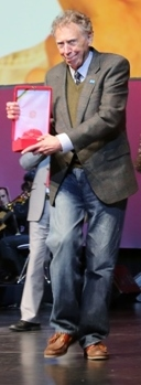 Recorte de File:Ministra da Cultura, Marta Suplicy, entrega medalhas da Ordem do Mérito Cultural 2013 (10706134763).jpg São Paulo (SP) | Ministério da Cultura celebra a Ordem do Mérito Cultural 2013. Na foto: José Antunes Filho. 05.11.2013 Foto: Elisabete Alves